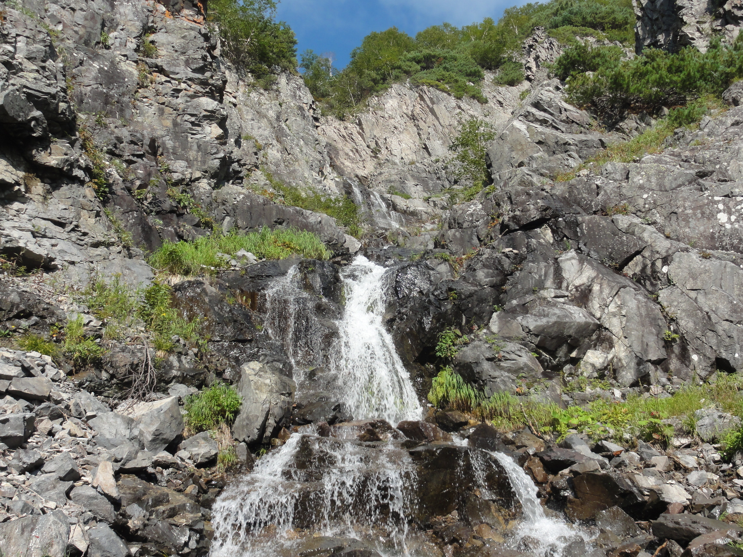 Водопад Тысячный, расположенный на безымянном притоке кл. Медвежий в верховьях Амгу на высоте ок. 1000 м над ур. моря.